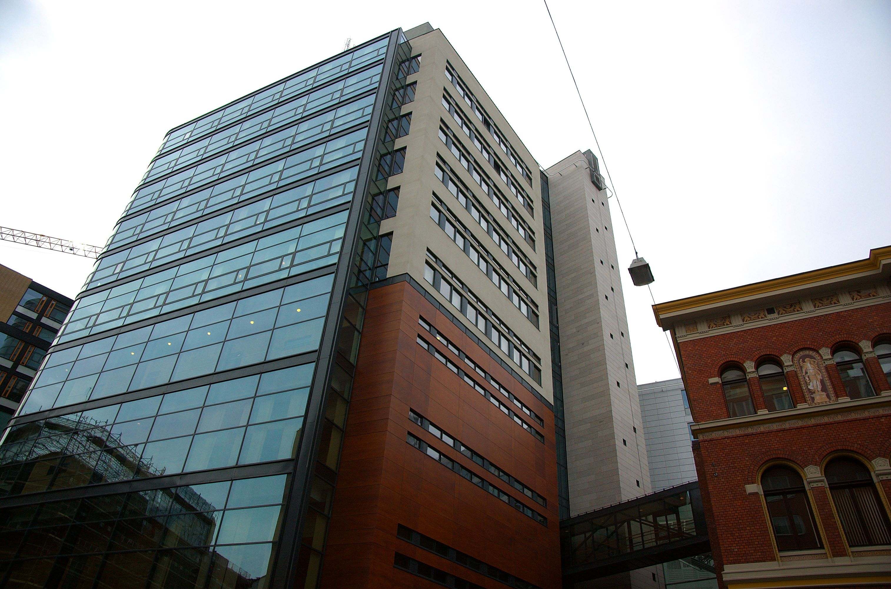 Borgarting Lagmannsrett i Munchs gate i Oslo. Den nye bygningen sto ferdig i 2005 og er tegnet av DARK Arkitekter i samarbeid med Solheim Jacobsen Arkitekter og Zinc AS.